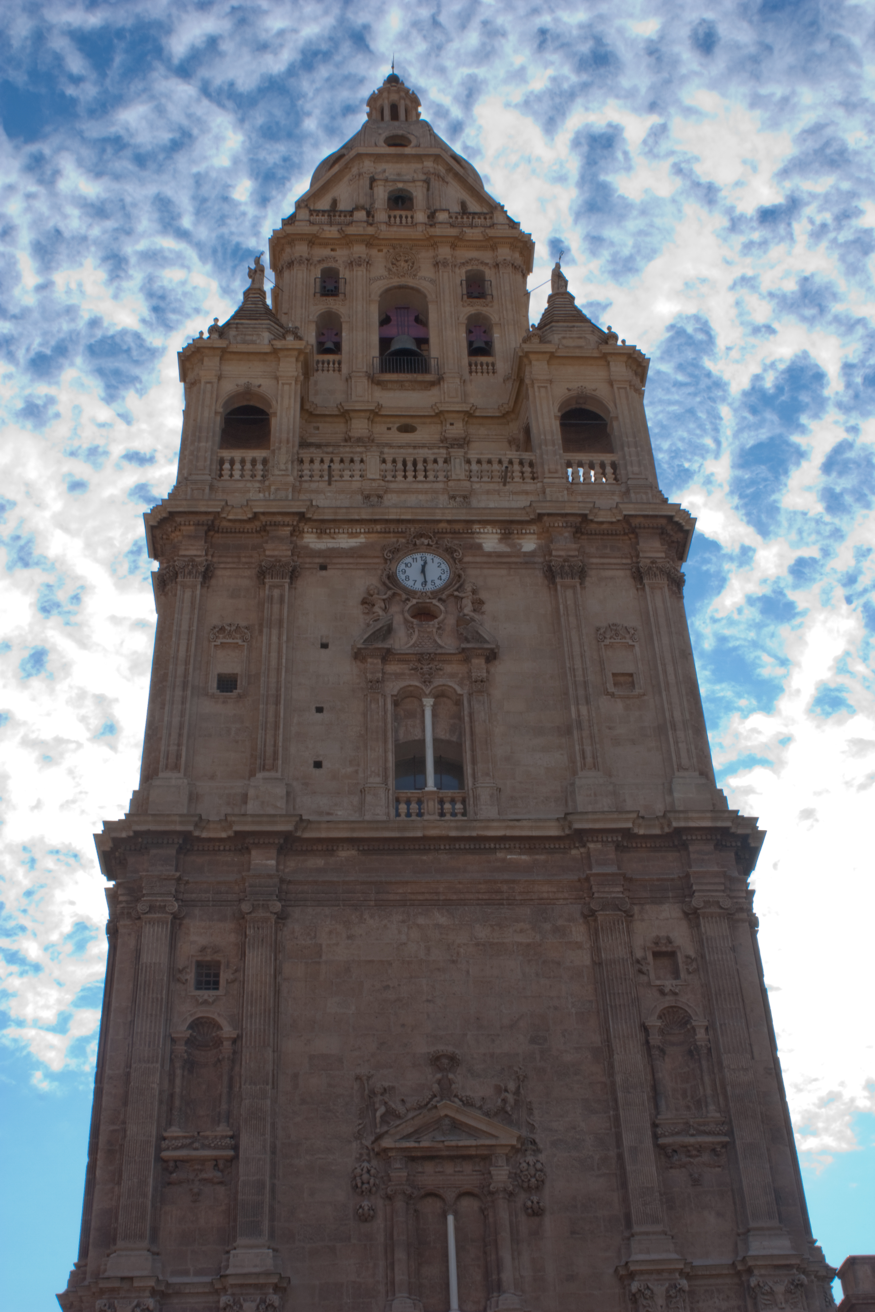 Catedral de Murcia. Cámara: Canon EOS 450D. Objetivo:EF-S18-55mm f/3.5-5.6 IS. Apertura: f/22. Tiempo de exposición: ¹⁄₁₅ s. Focal: 27 mm. Flash:no flash. Iso:100 Flash:no flash